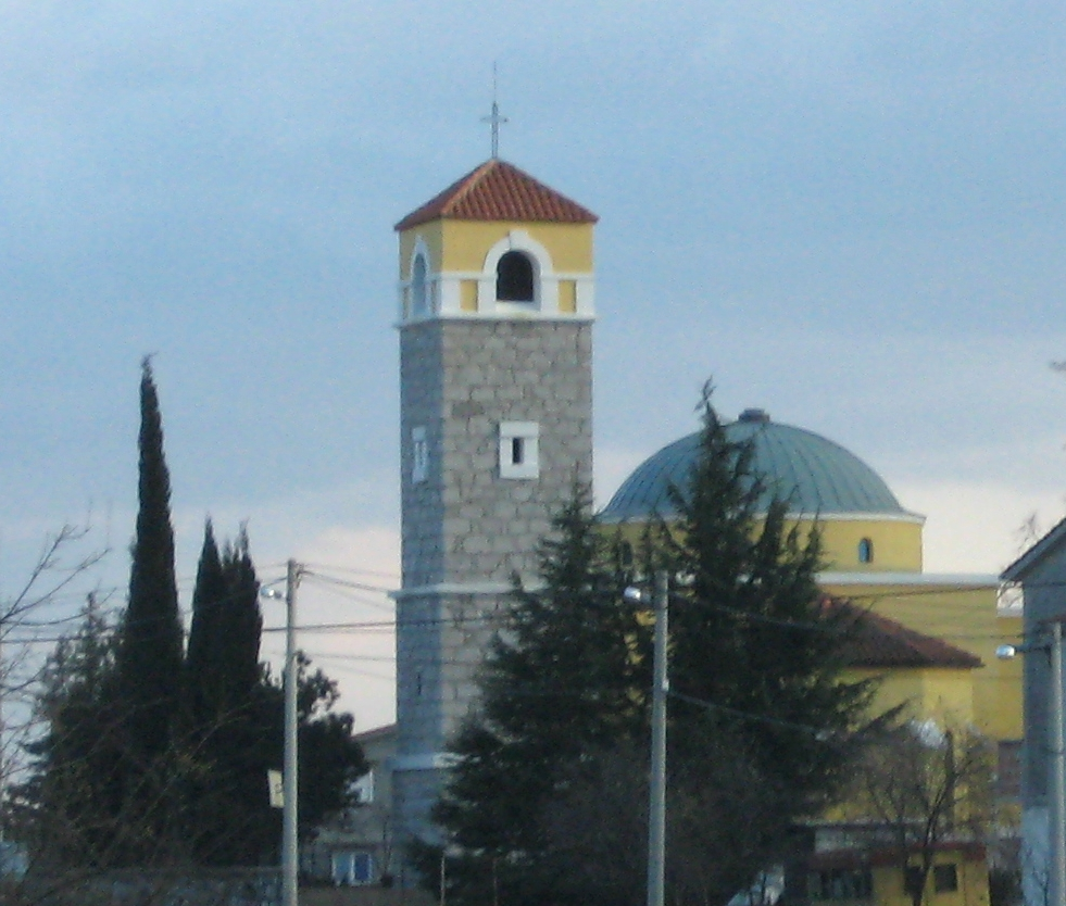 Crkva svetog Jurja na Drenovi, Rijeka